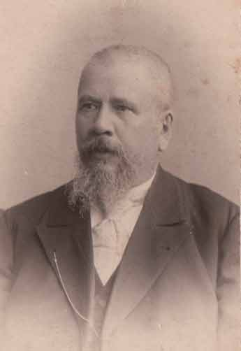 Анатолий Васильевич Лазаревский служил в Саратовской судебной палате в чине действительного статского советника. В 1907 году открыл в Гатчине библиотеку, кот. была самым крупным книжным городским собранием в предреволюционный период (20 тысяч томов). В 1919 году библиотека была передана городу Гатчина. В детстве был знаком с Шевченко, в юности - с Некрасовым, а в преклонном возрасте - с Куприным.